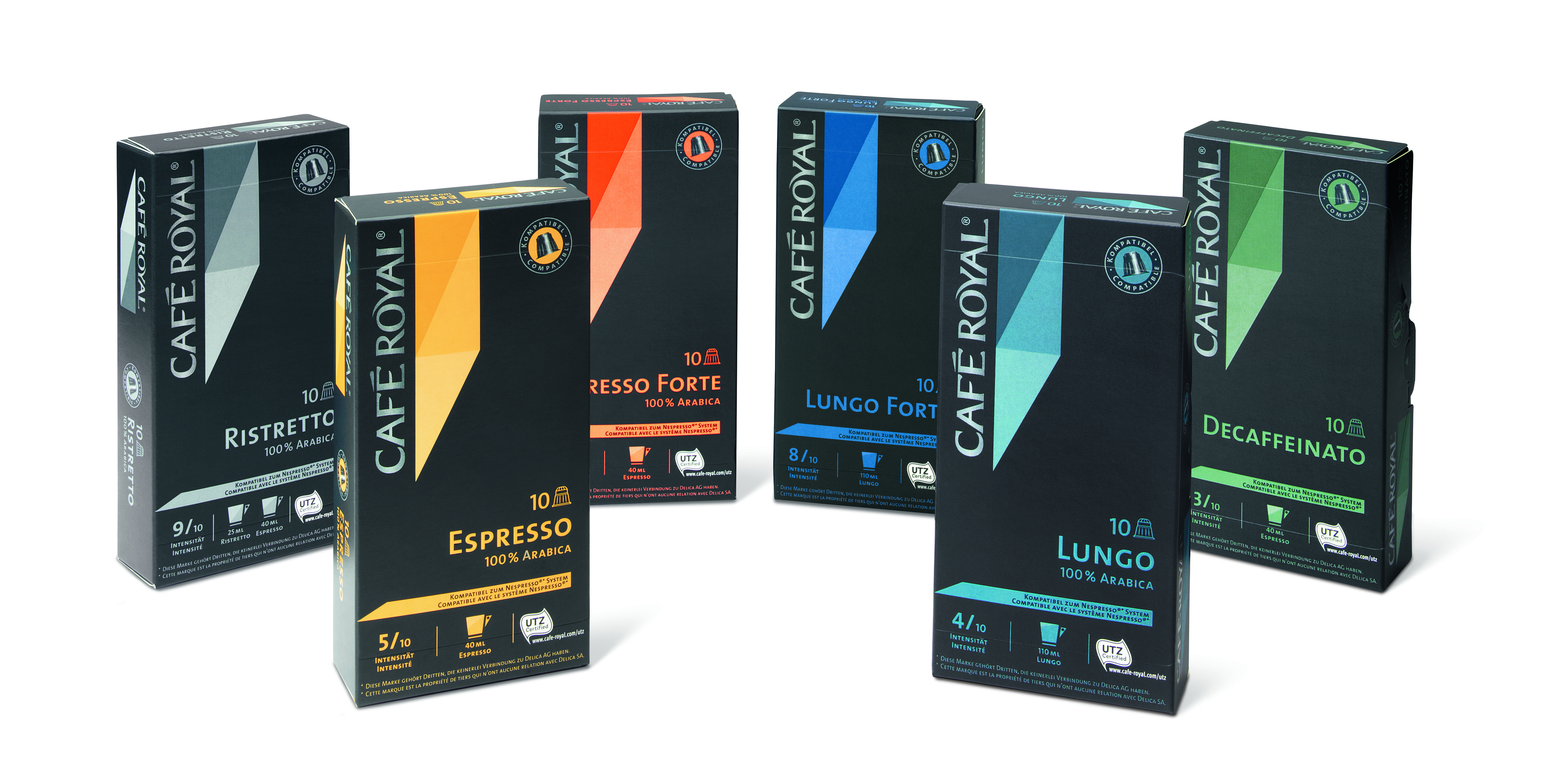 Auswahl Café Royal